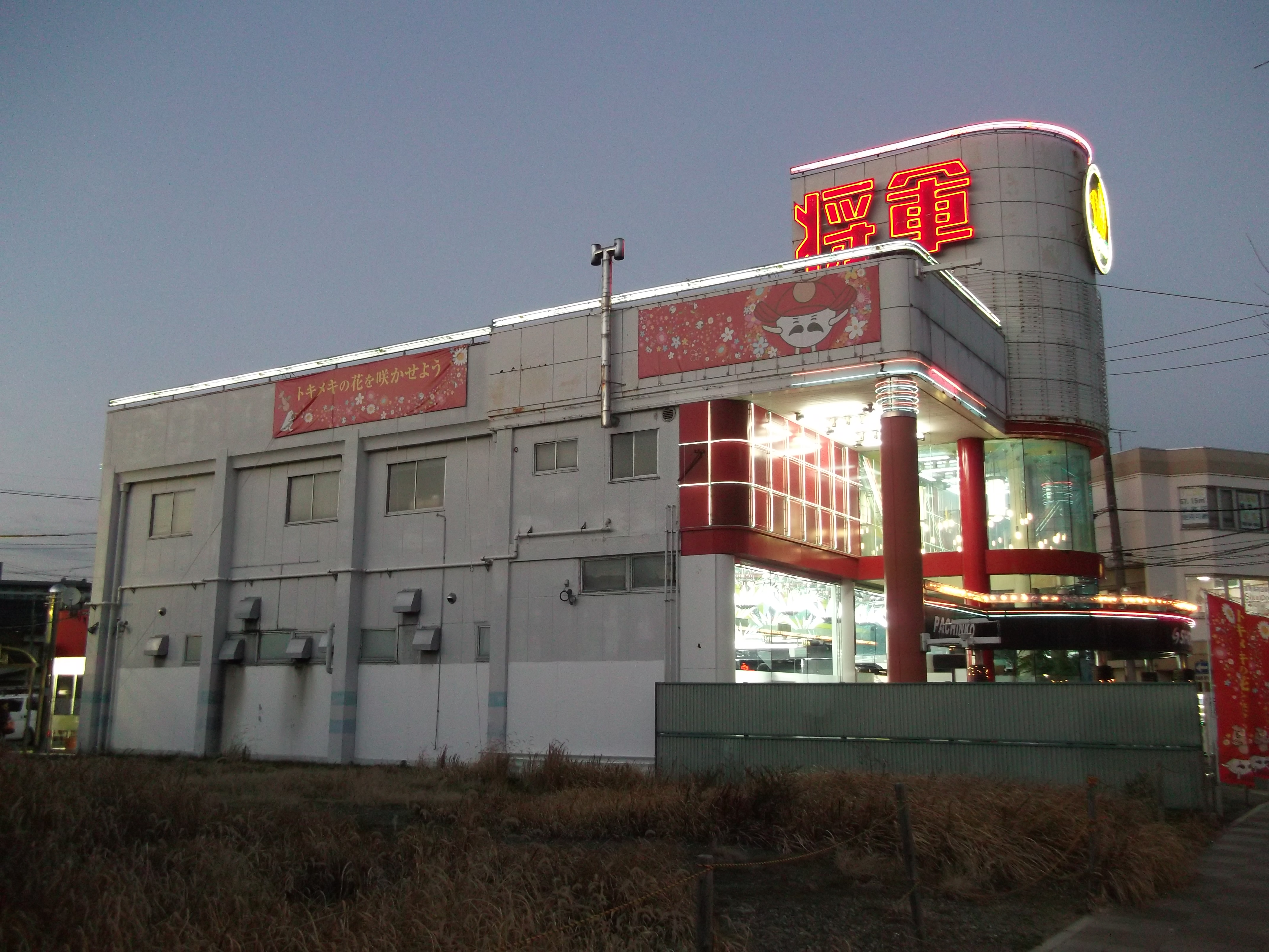 名古屋市北区稚児宮通にあるパチンコ店「将軍」黒川本店